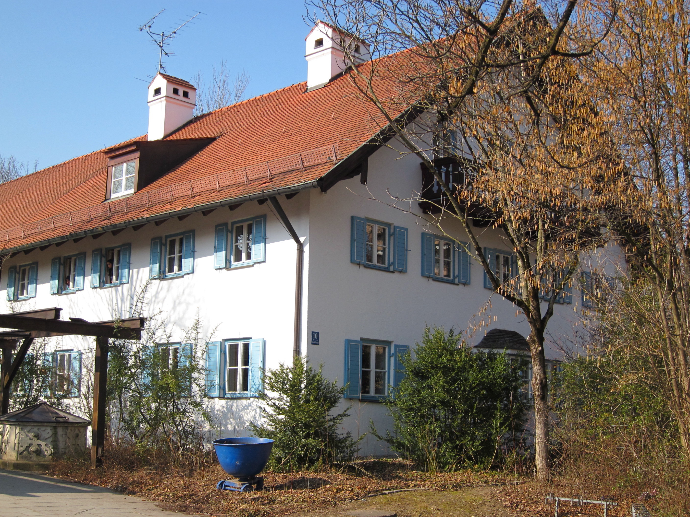 Josephsburgstraße 10; Einfirstbau, mit Putzbändern, 2. Hälfte 19. Jh.